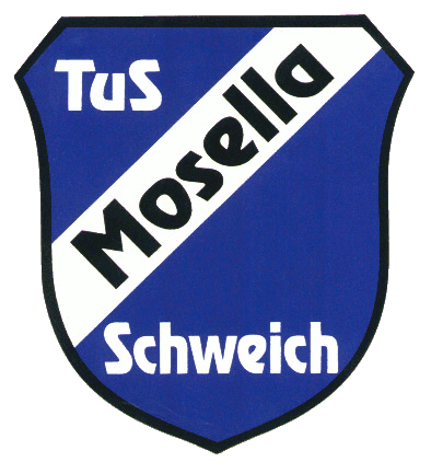 Logo TuS Mosella Schweich